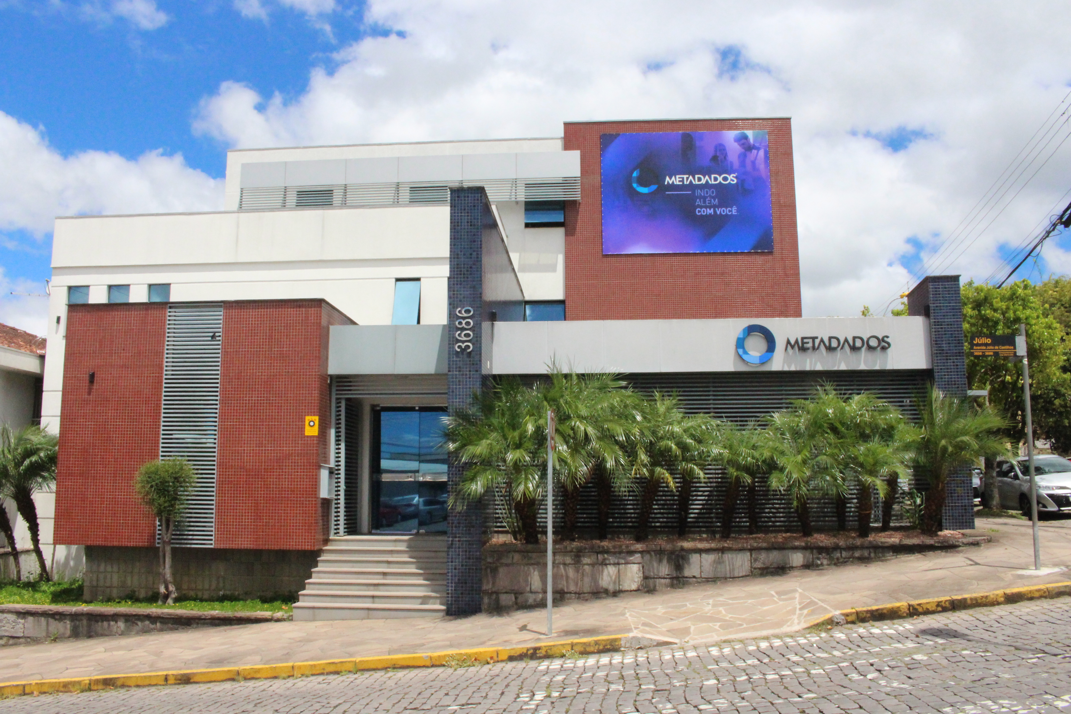 Matriz da Metadados, localizada em Caxias do Sul - RS.